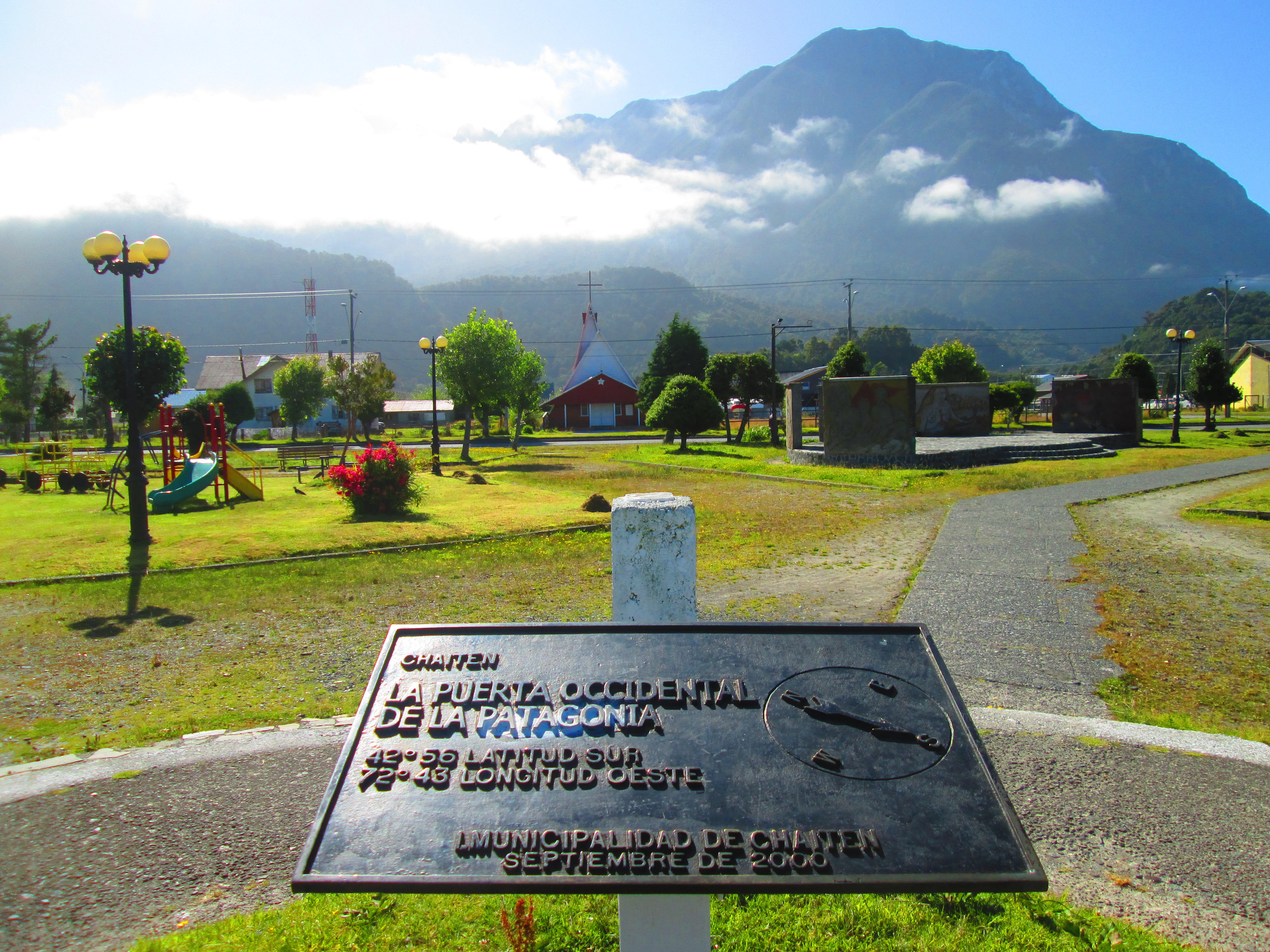 Vista de la plaza de la ciudad de Chaitén con su iglesia al fondo.